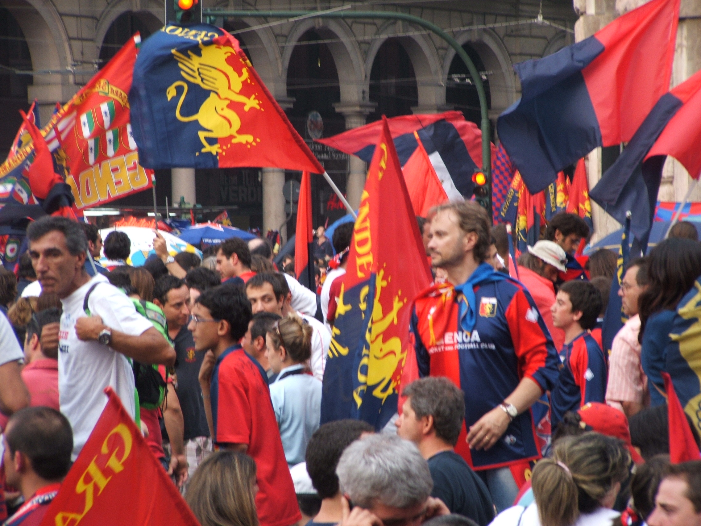 Genova, festeggiamenti per la promozione del Genoa CFC in Serie A